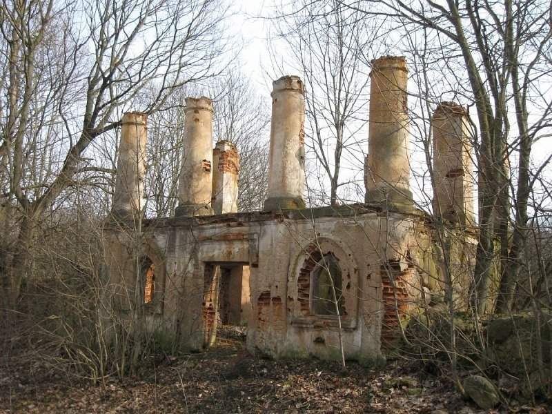 Сунаі. Рэшткі сядзібна-паркавага комплексу ”Пукава”